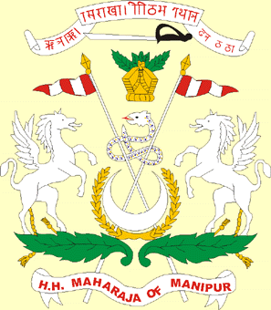 Escudo de Manipur Imagen realizada por J. Ollé Véase también: Wikipedia:Autorizaciones/Banderas de Jaume Ollé Categoría:Banderas (imagen) Categoría:Heráldica (imagen)